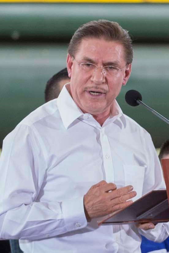 José Rosas Aispuro en la entrega del Libramiento Ferroviario de Durango.